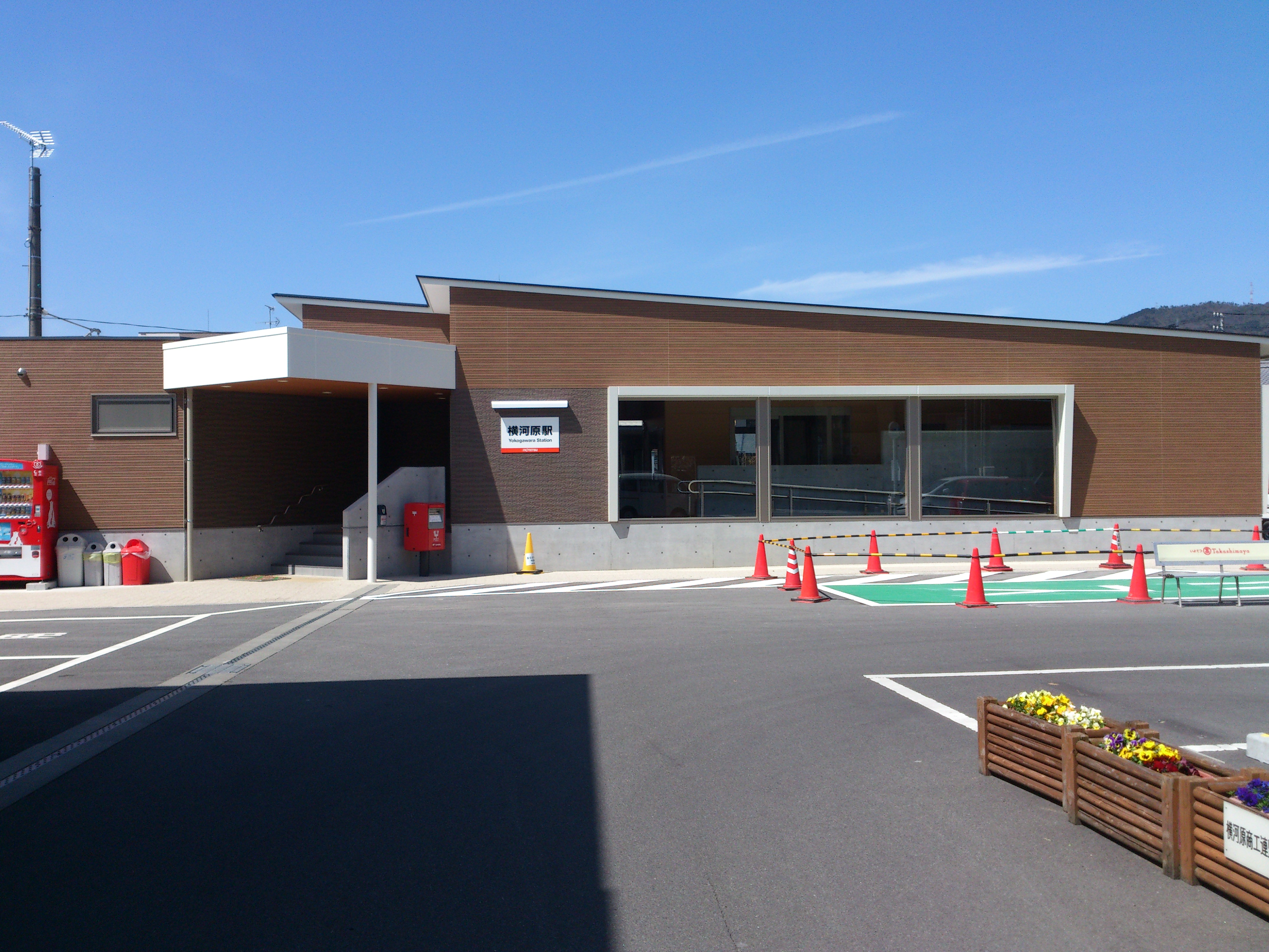 伊予鉄道、横河原駅です。